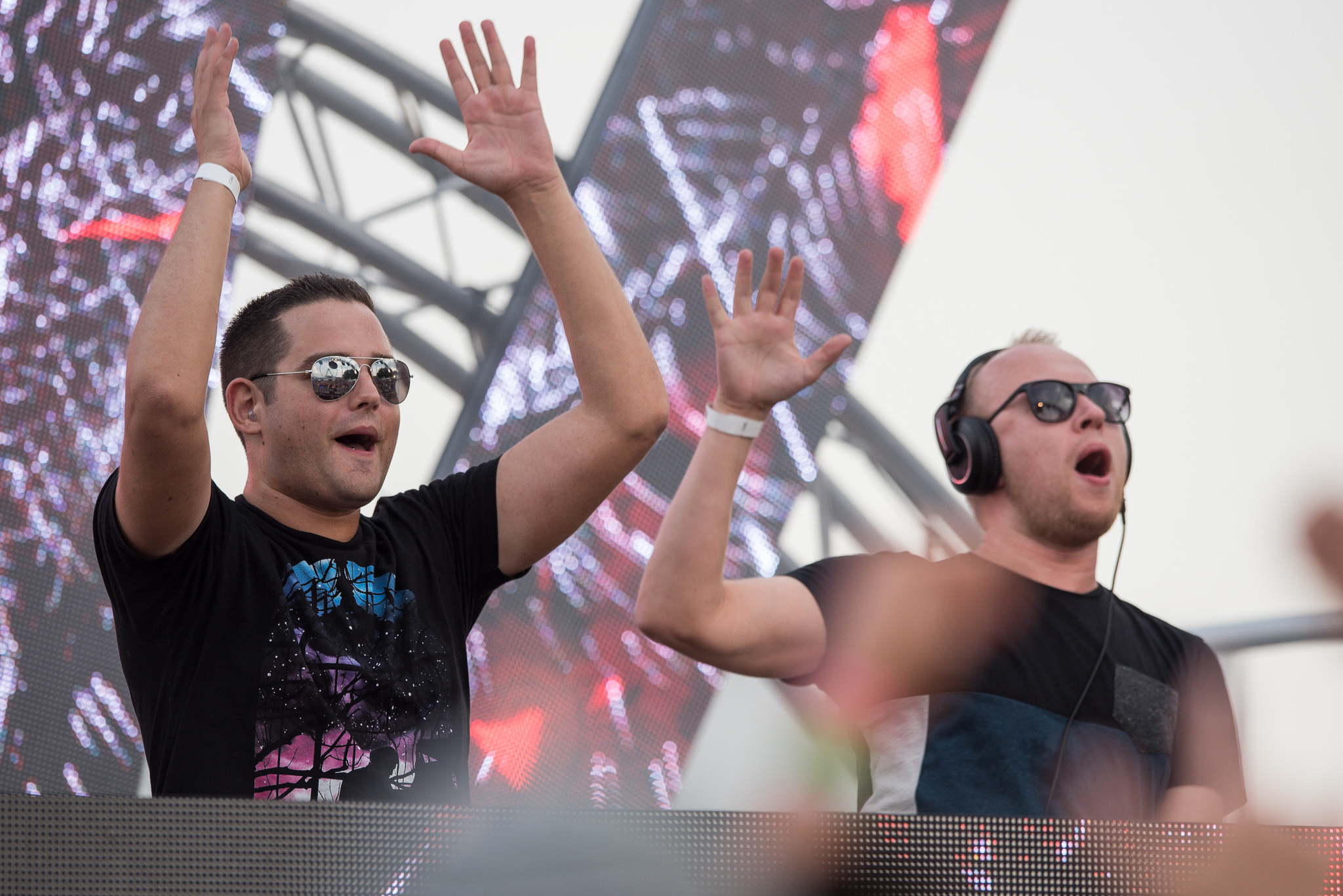 3rd Stage,Da Tweekaz,Festival,Konzert,Livekonzert,Livemusik,Musik,Open Beatz 2016